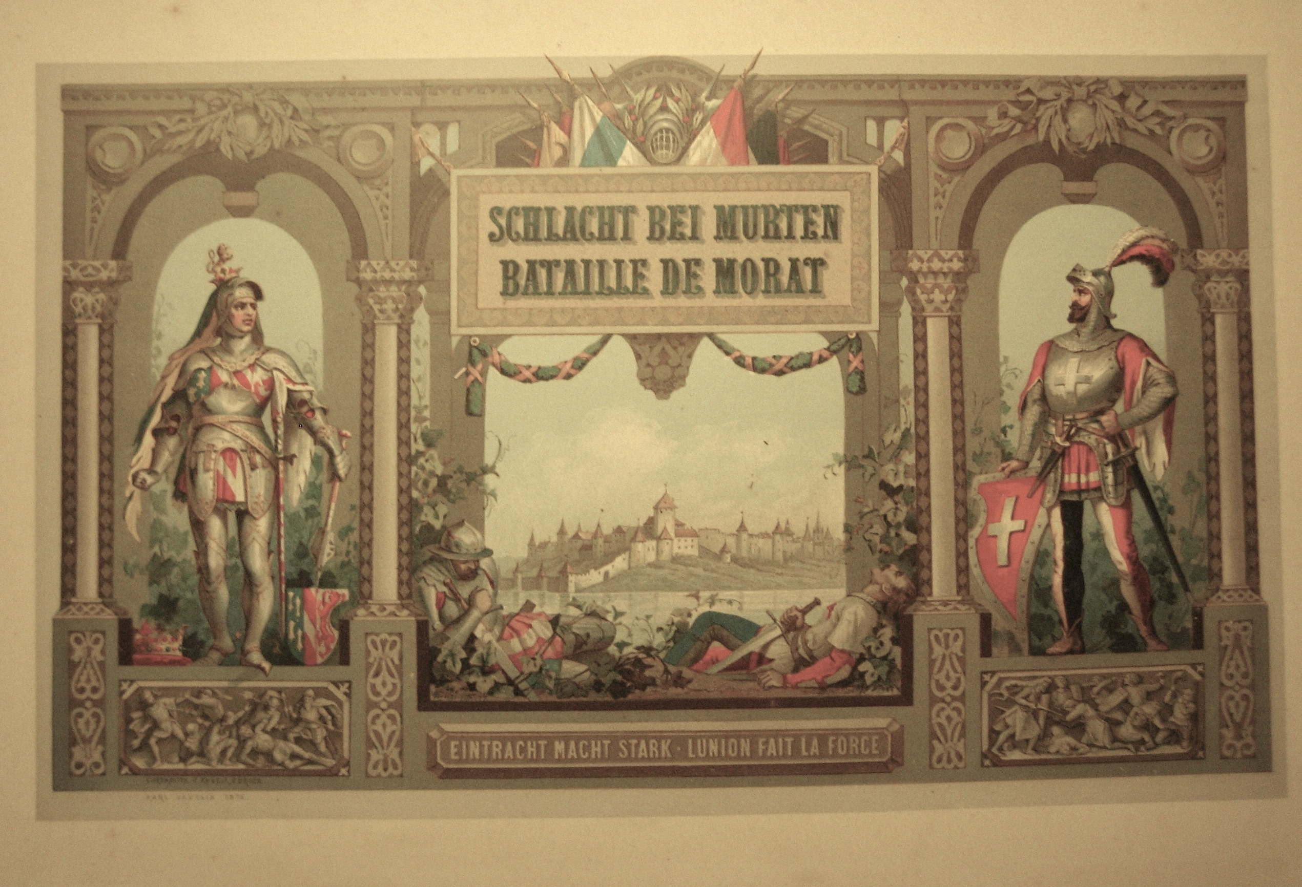 Plakat zur Schlacht von Murten von Karl Jauslin